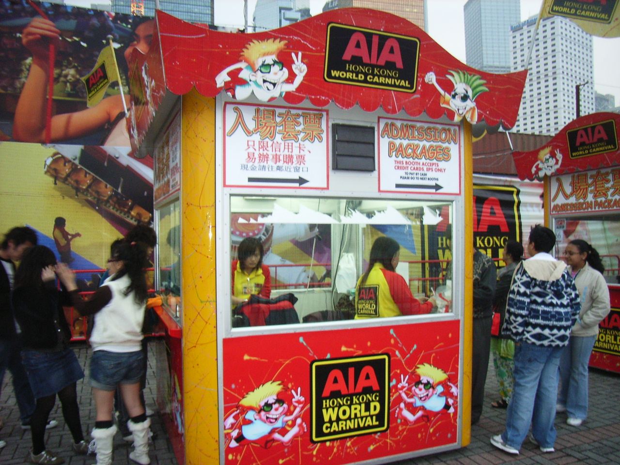 Tamar site (添馬艦地盤), 未來zh:香港特別行政區政府總部, 金鐘, Admiralty, Hong Kong.